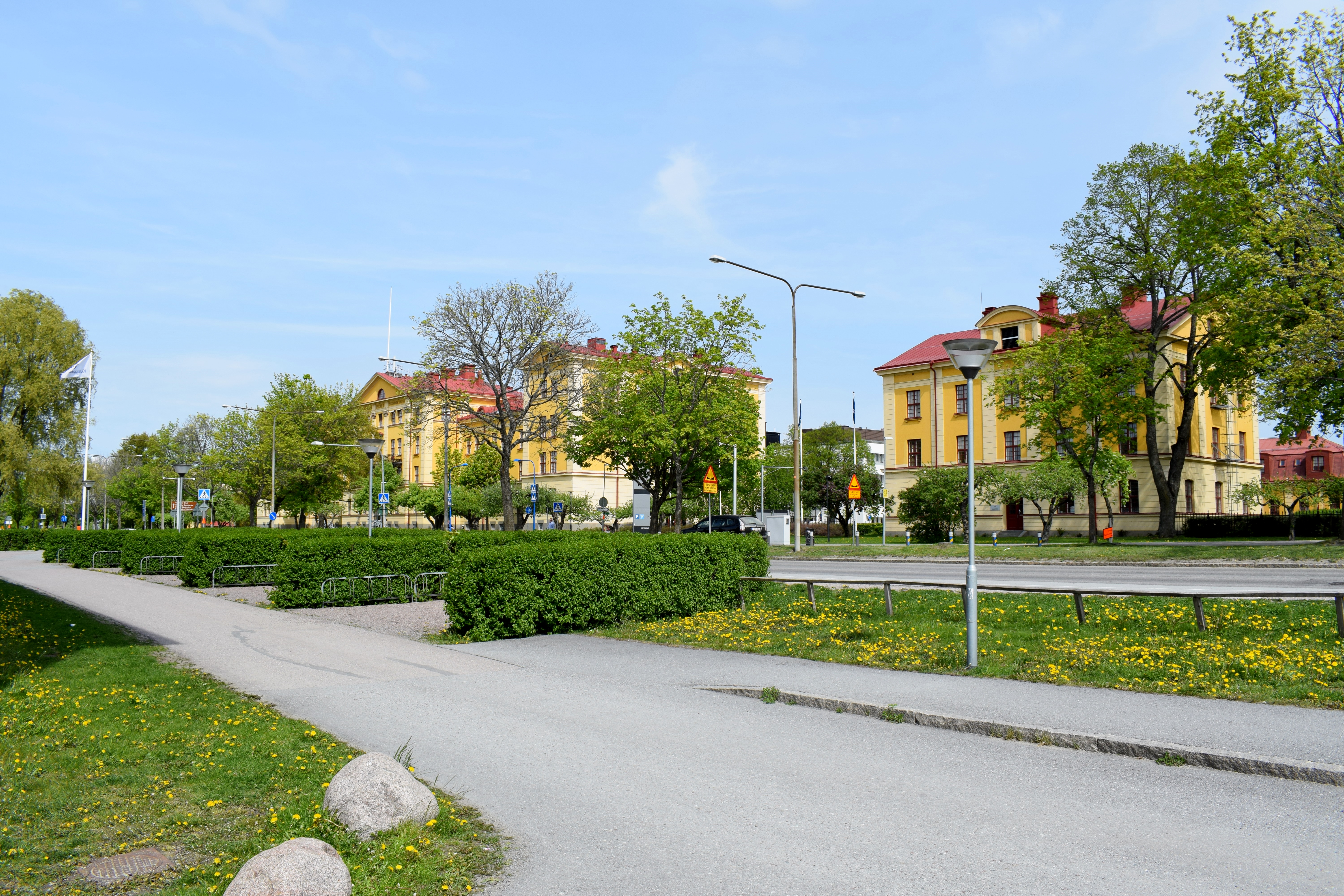 Kasernetablissement vid Dag Hammarskjölds väg i Uppsala. Kasernetablissementet uppfördes ursprungligen till Upplands artilleriregemente (1901–1927). Men kom även husera Artilleriets officersaspirantskola (1919–1927), Arméns underofficerskola (1928–1972), Stabsbiträdesskolan (1952–1965), Försvarets tolkskola (1957–1982), Arméns stabs- och sambandsskola (1958–1982), Arméns kompaniofficersskola (1972–1983).